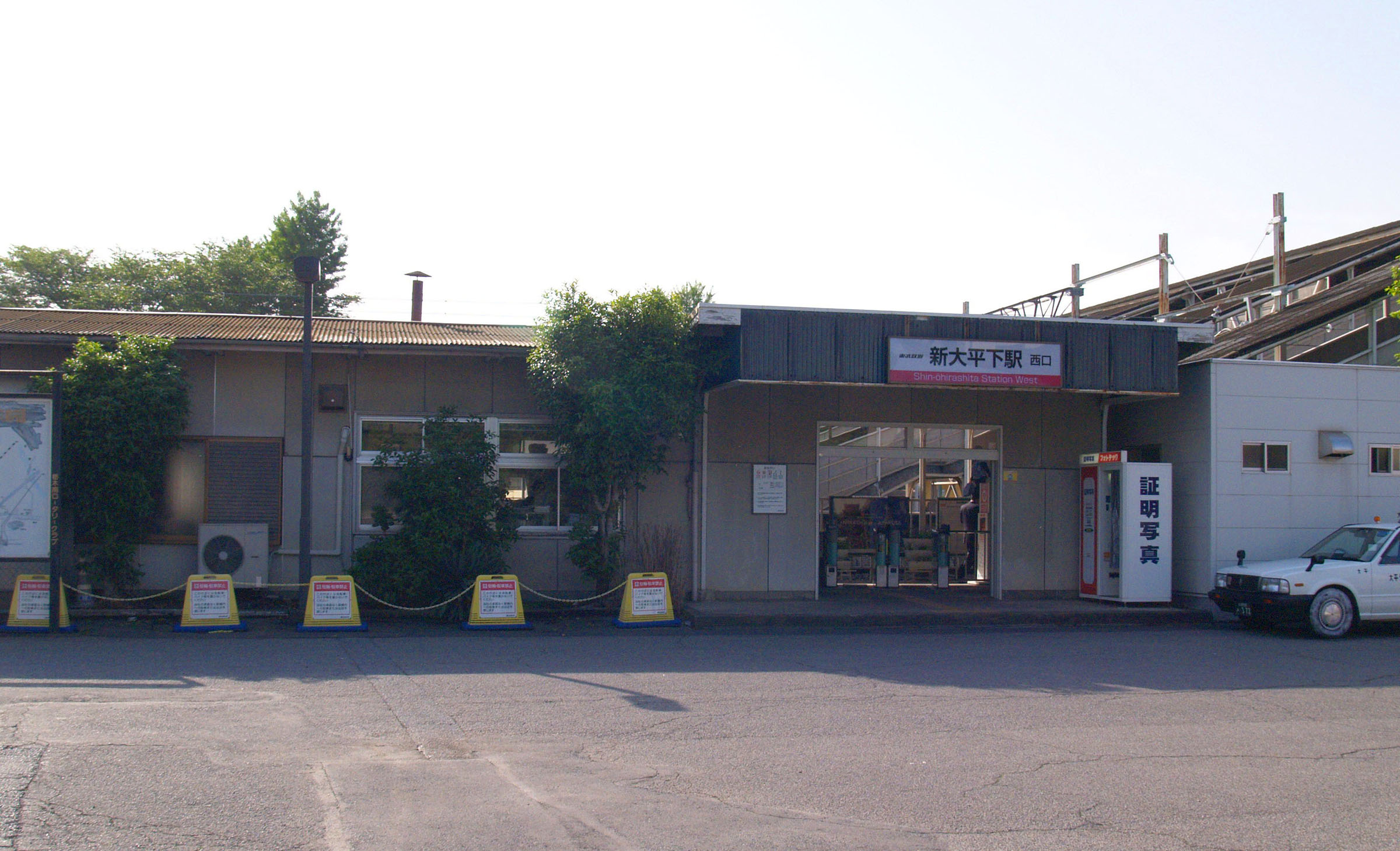 新大平下駅西口